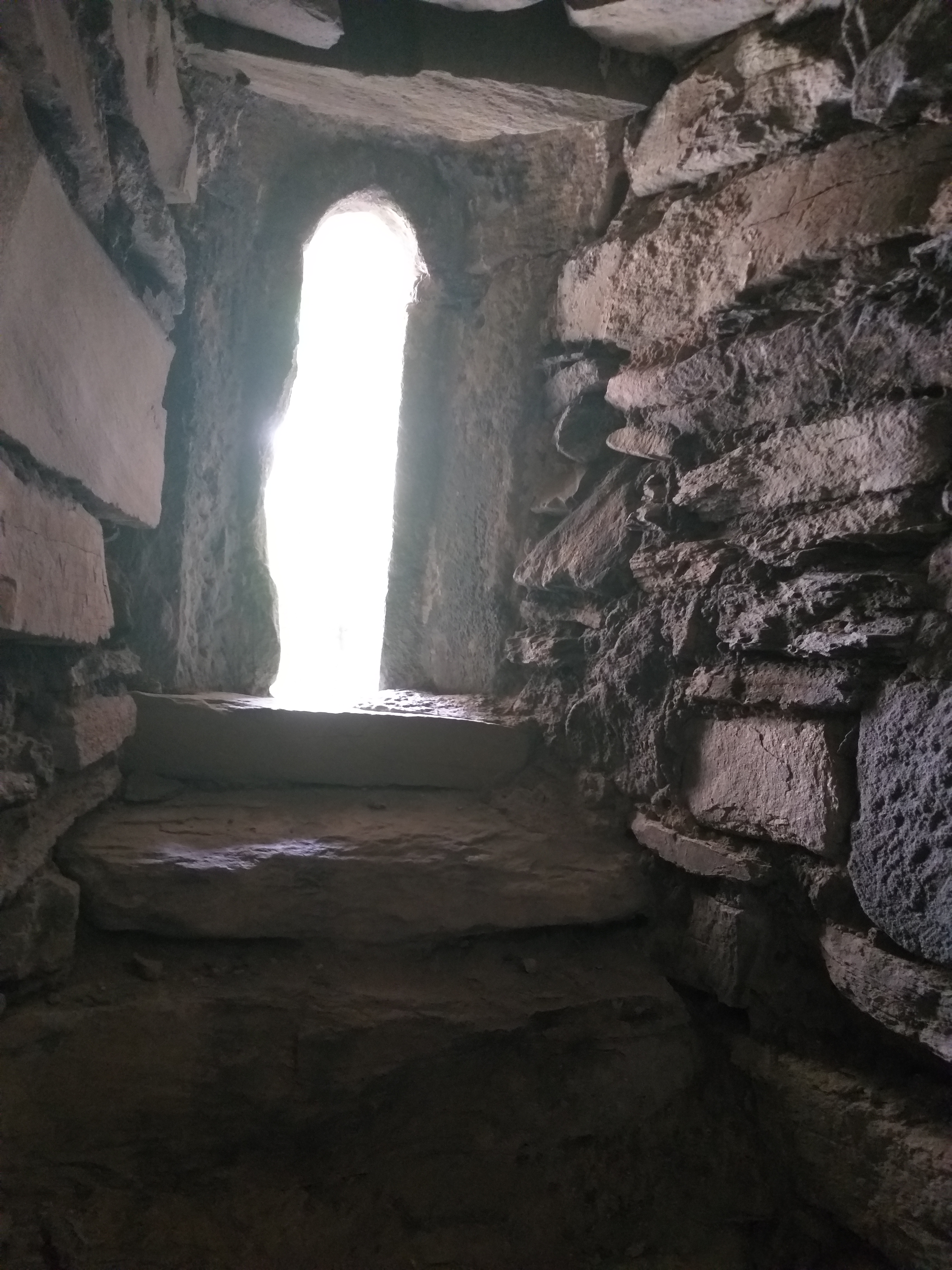 Fenster Westwand Südturm